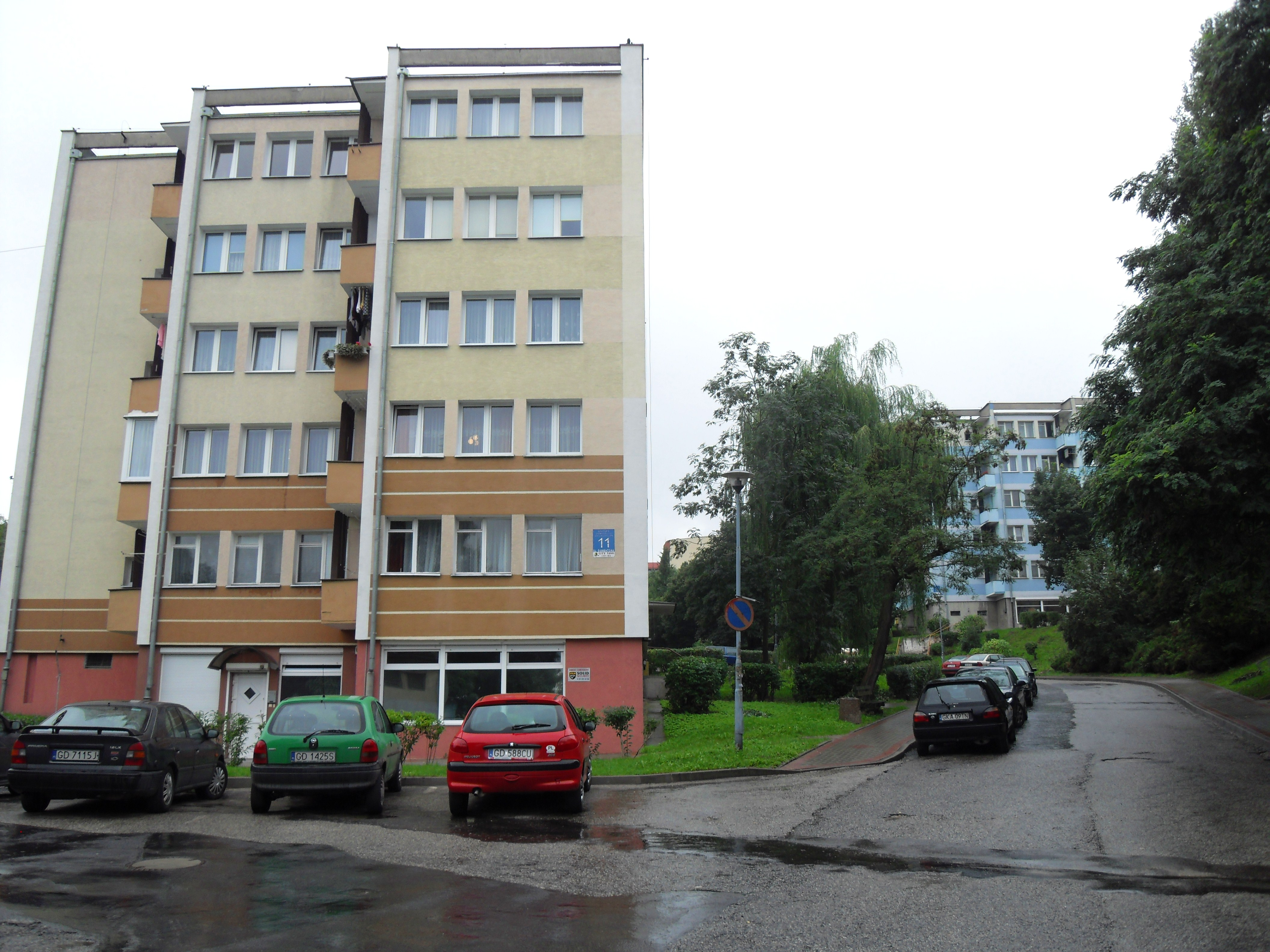 Gdańsk Orunia, osiedle Ptaszniki, ul. Diamentowa 11.